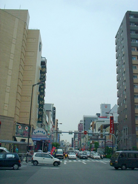 松屋町筋（大阪市中央区） 松屋橋交差点から北望